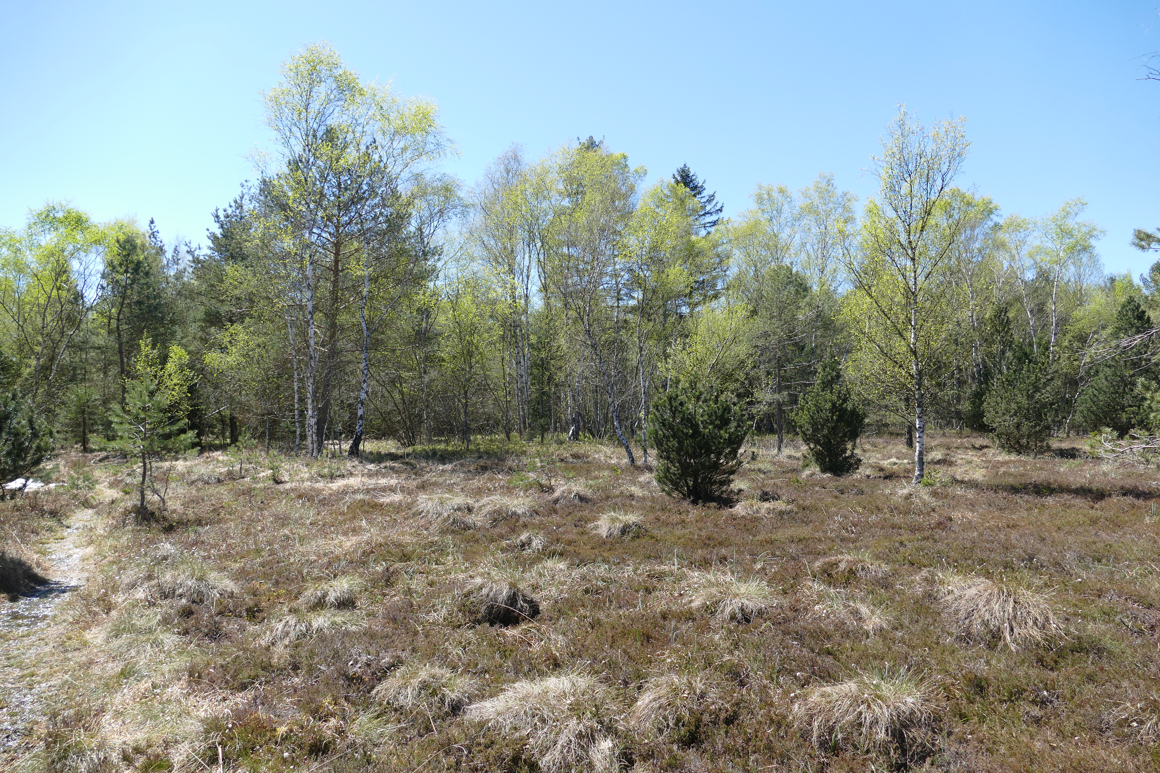 (NSG:BY-NSG-00147.01)_Magnetsrieder Hardt